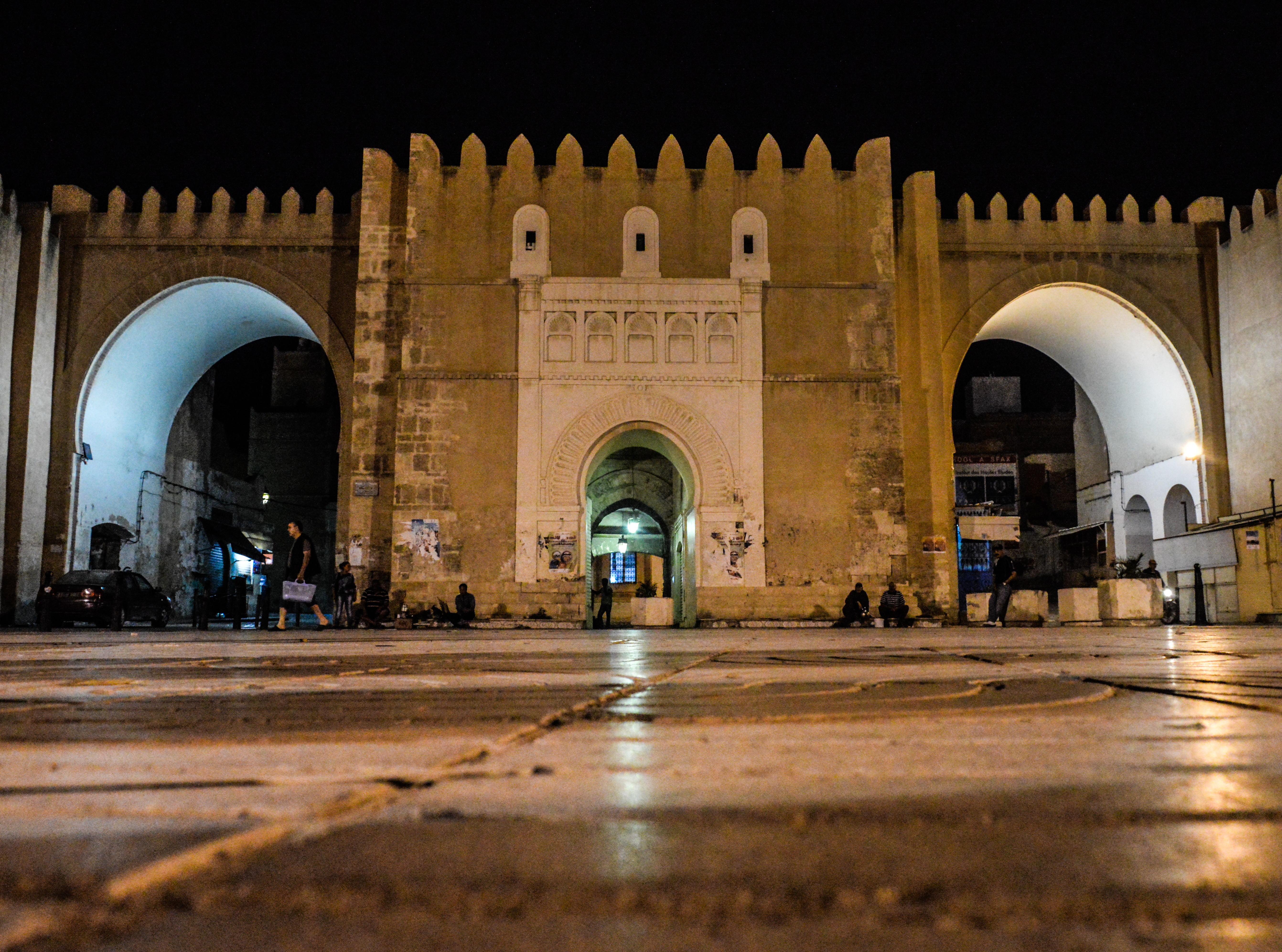 صورة ليلية لباب الديوان صفاقس